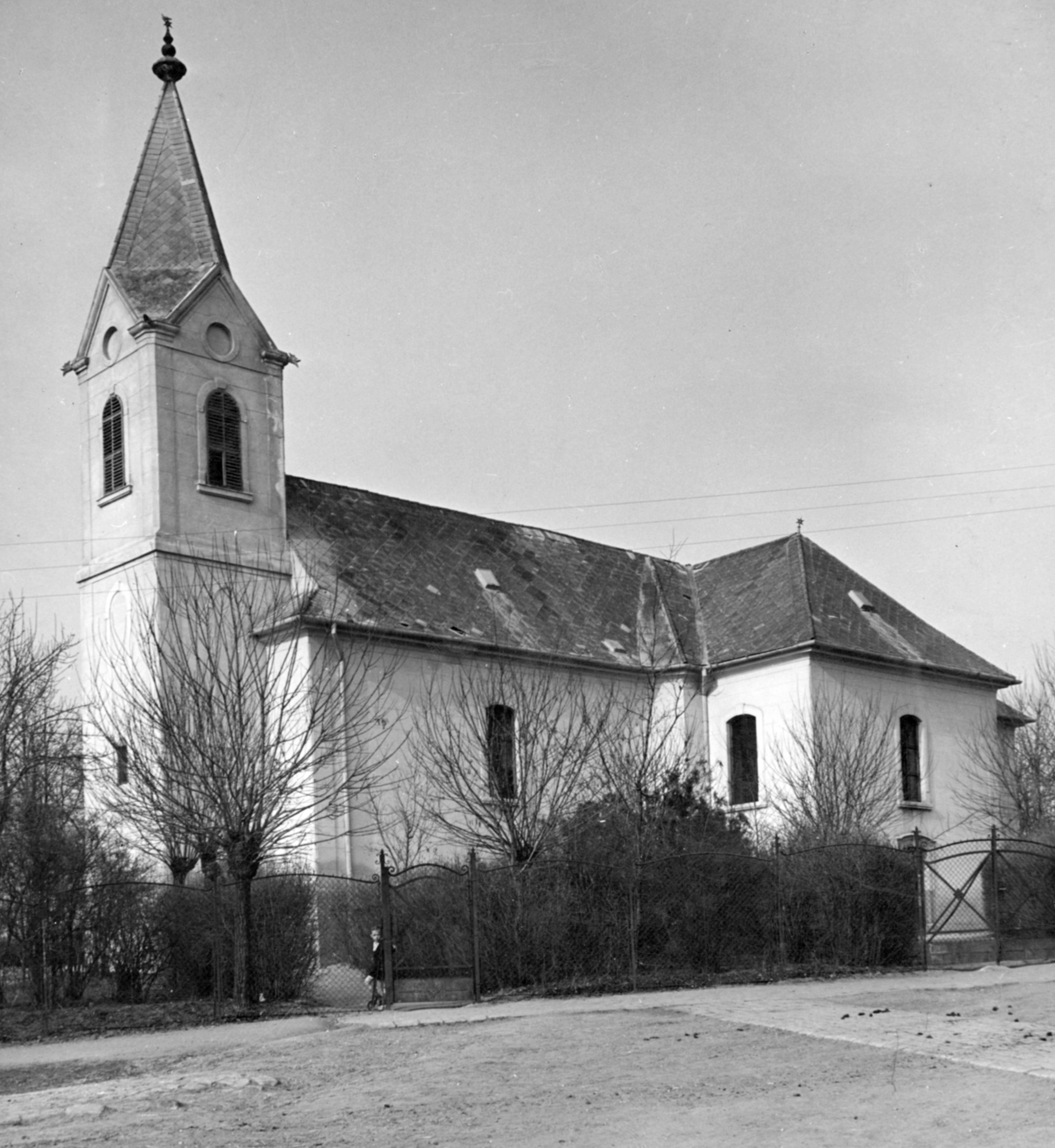 Rózsalevél utca 46. Cinkotai evangélikus templom. Location: Hungary, Budapest XVI. Tags: church, Budapest Title: Rózsalevél utca 46. Cinkotai evangélikus templom.